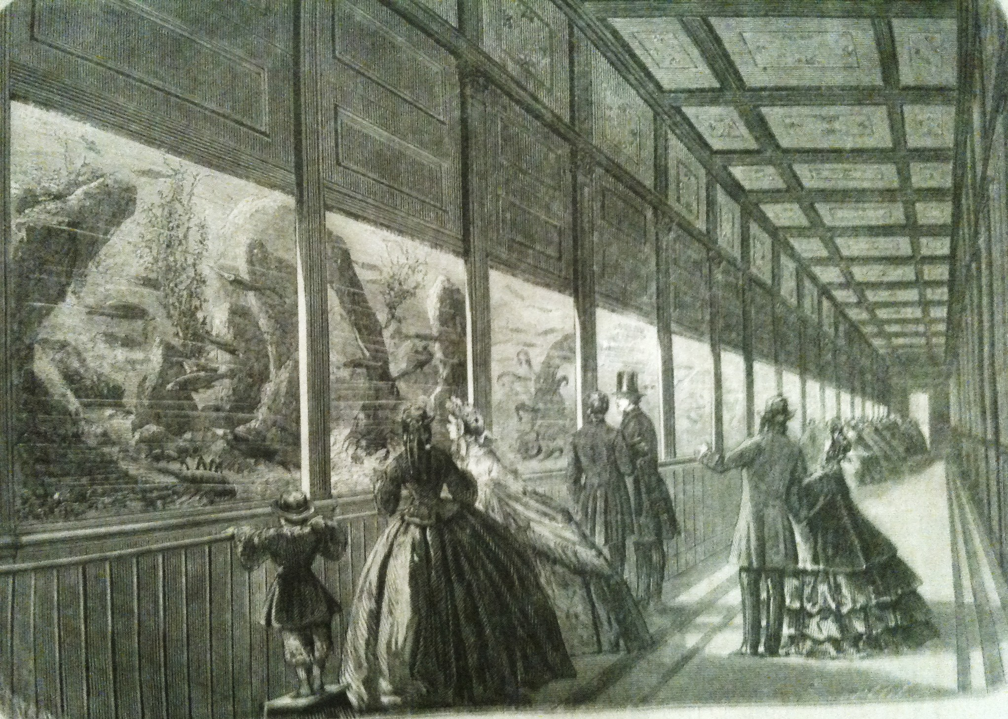 Gravure de Bertrand.